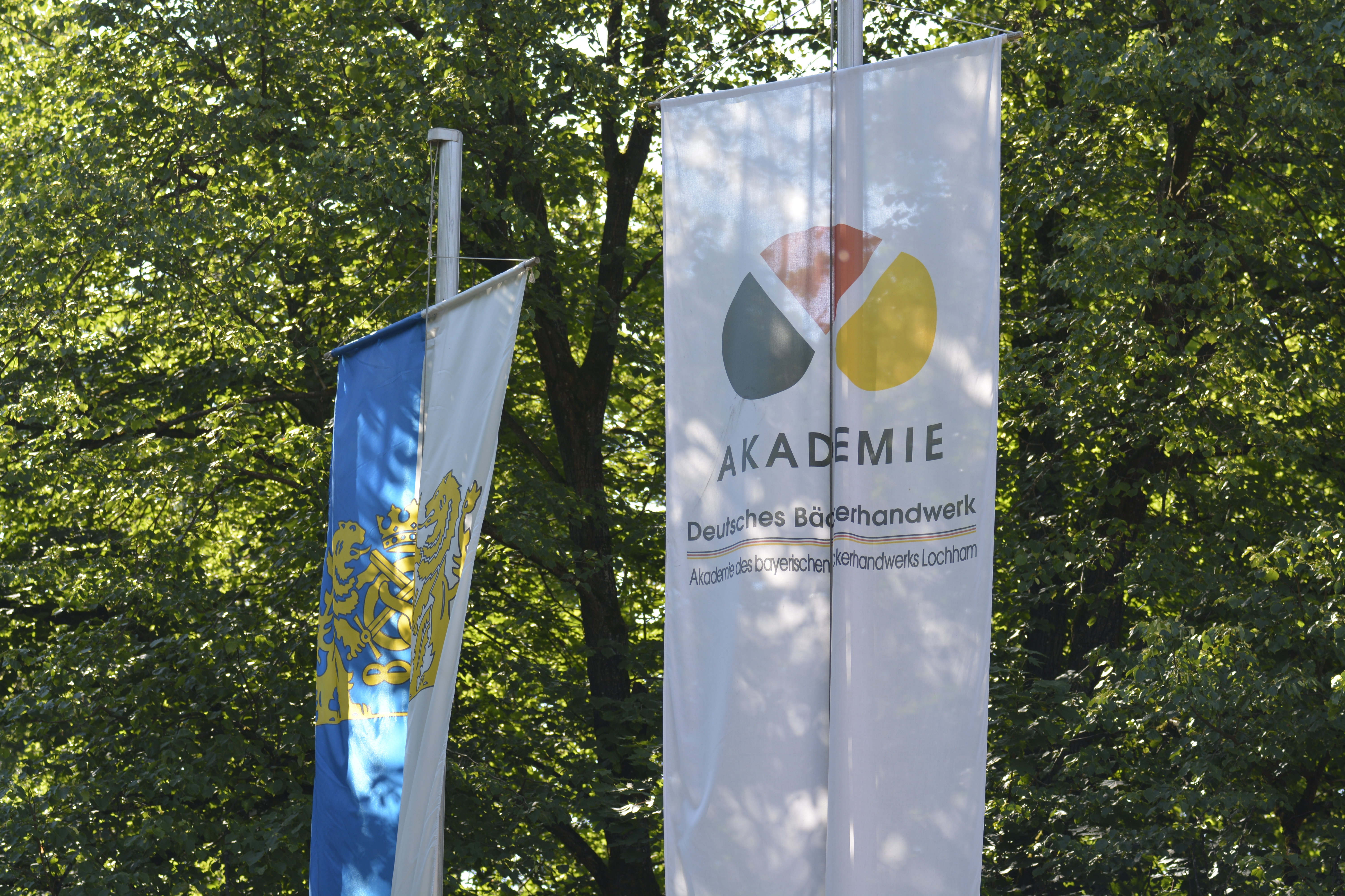 Akademie bayerisches Bäckerhandwerk